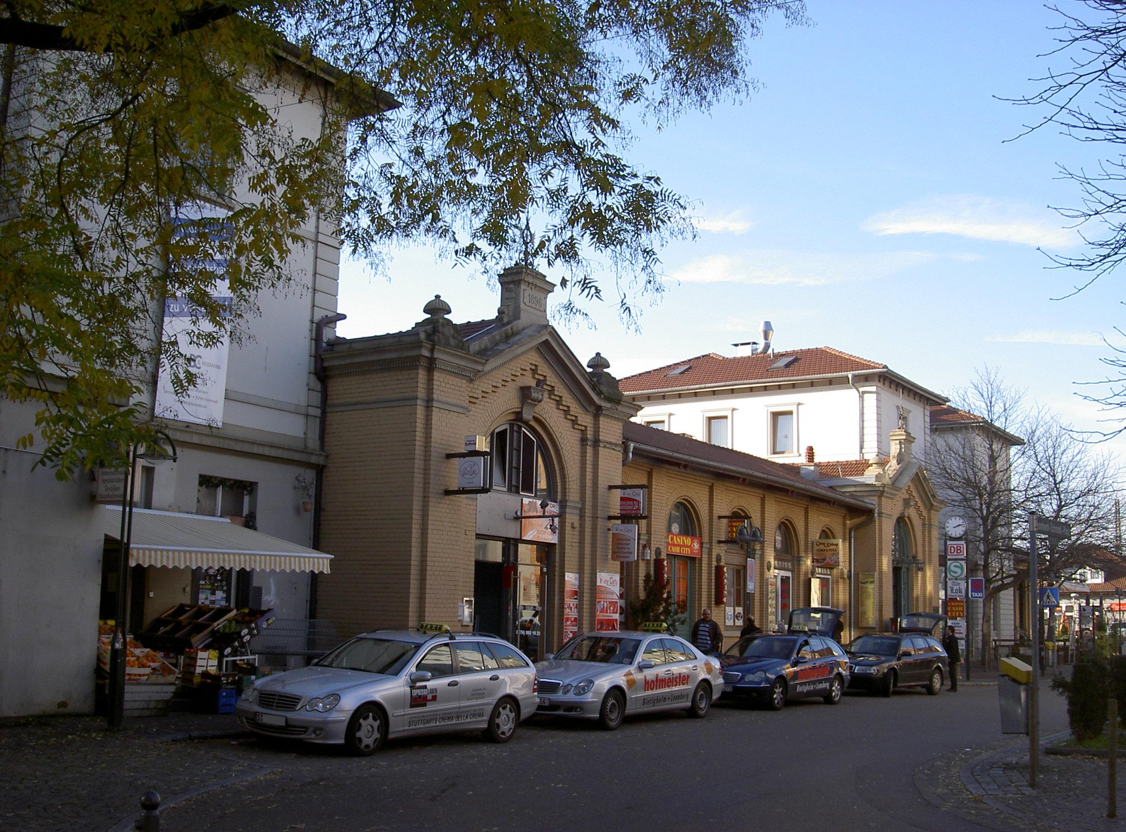 Empfangsgebäude des Personenbahnhofs Stuttgart-Untertürkheim